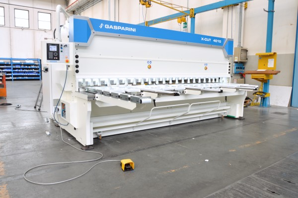 Hydraulic CNC-controlled guillotine shear